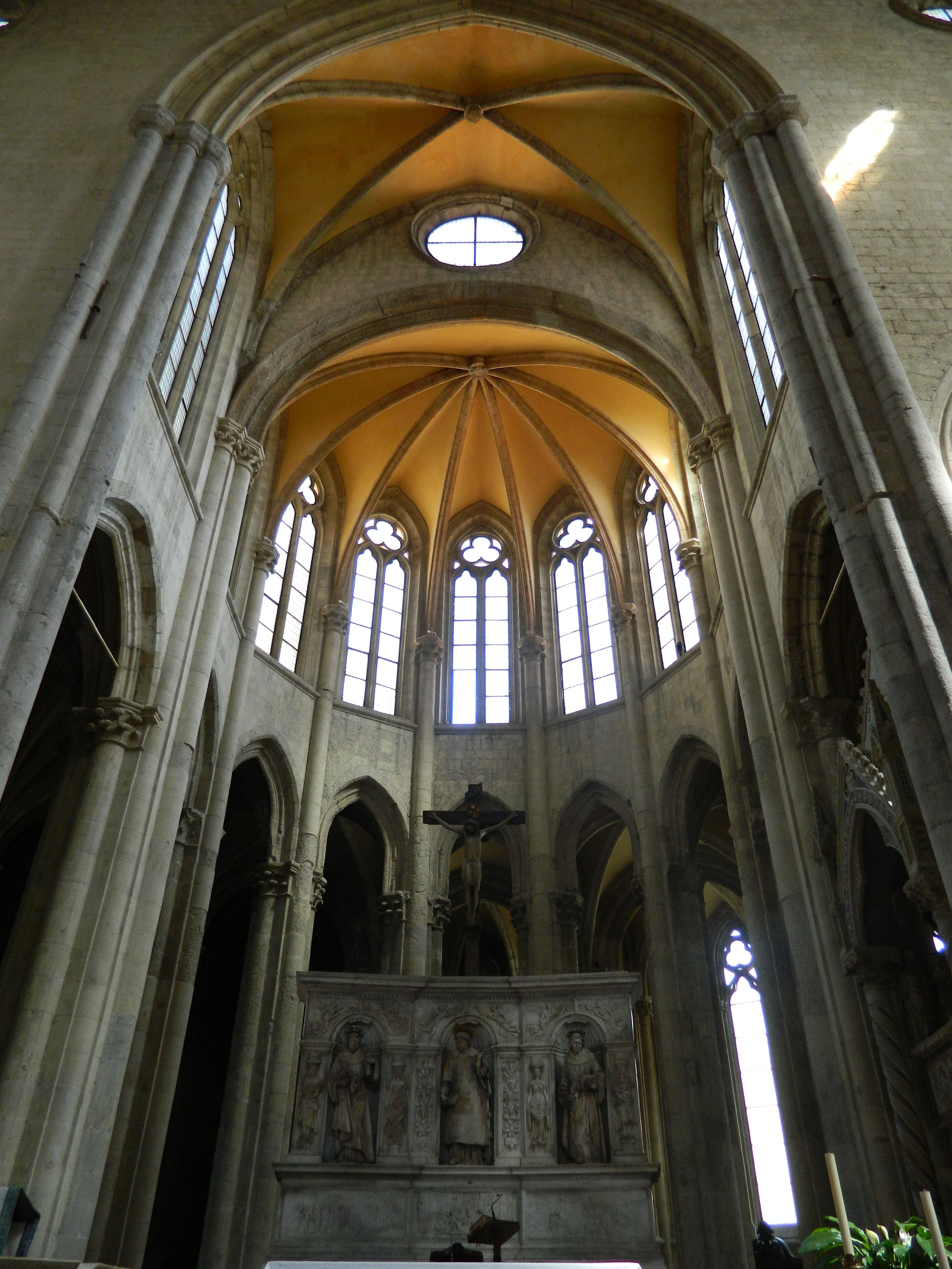 Basilica di San Lorenzo Maggiore (Napoli) - L'abside in gotico francese